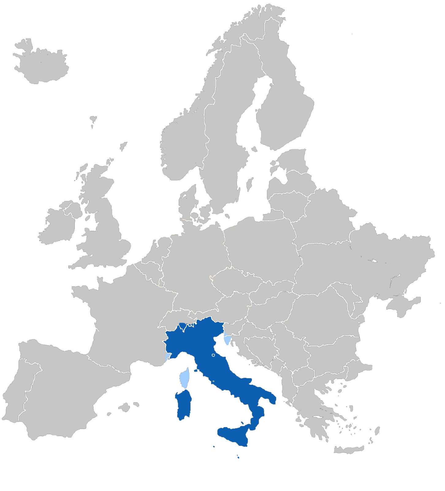 L'Europa italianofona Blu: Lingua madre Celeste: Lingua comune o secondaria